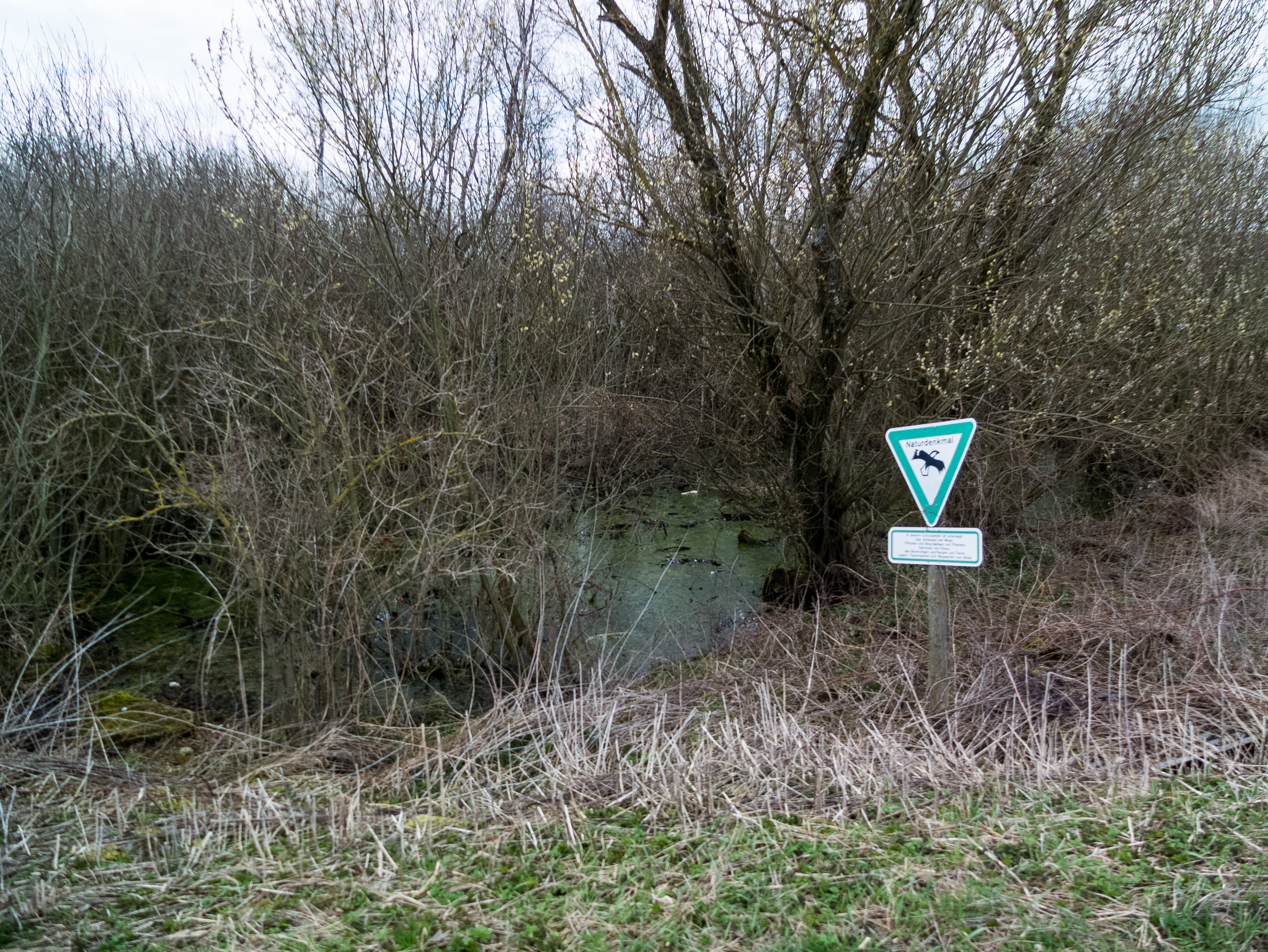 Biotop und Naturdenkmal Kügelhofer Moortopf - eine wassergefüllte Doline östlich des Kügelhofs bei Amrichshausen